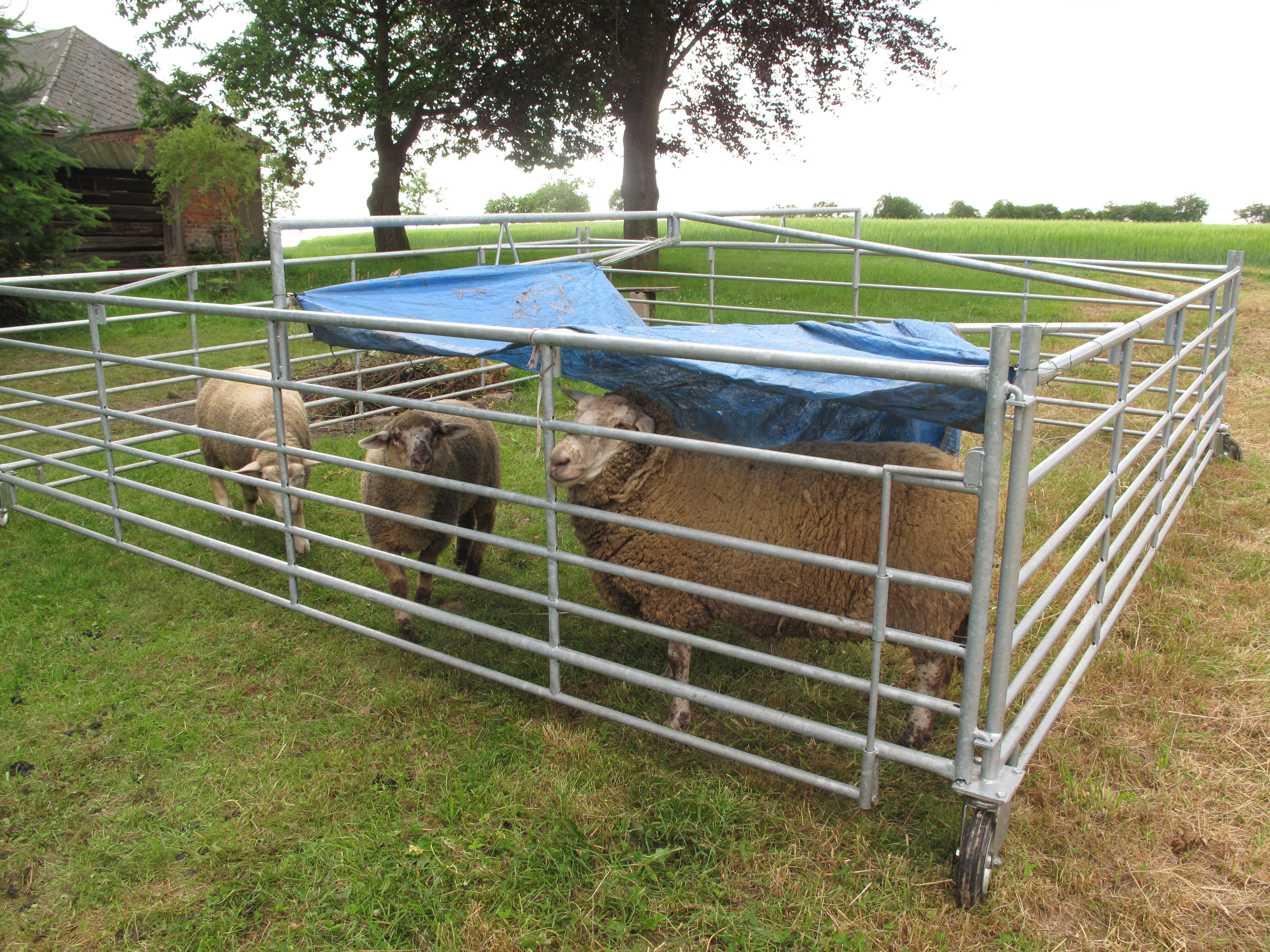 Česky: Boušín, ovce